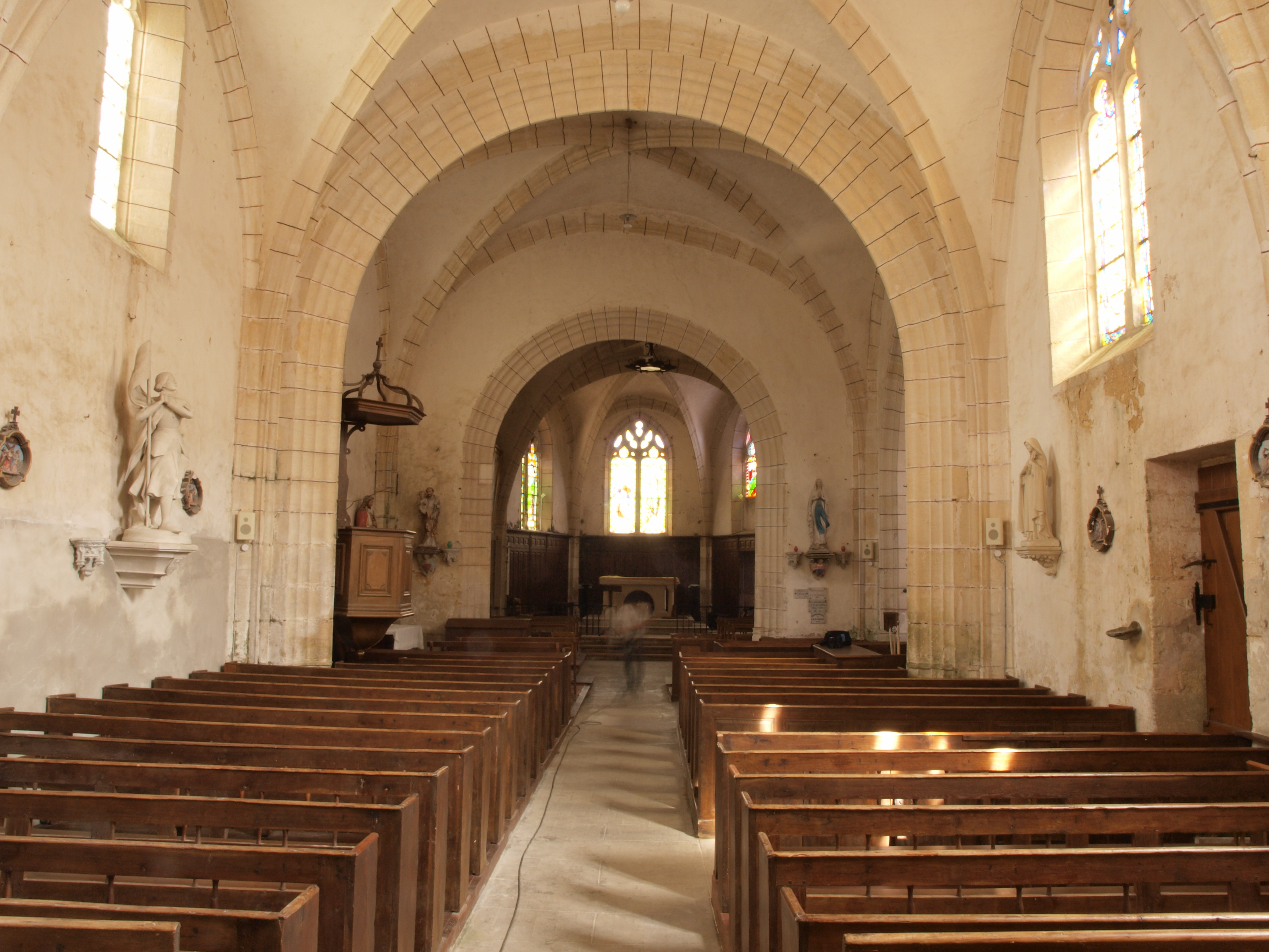 Sainpuits (Yonne, France) ; l'intérieur de l'église.